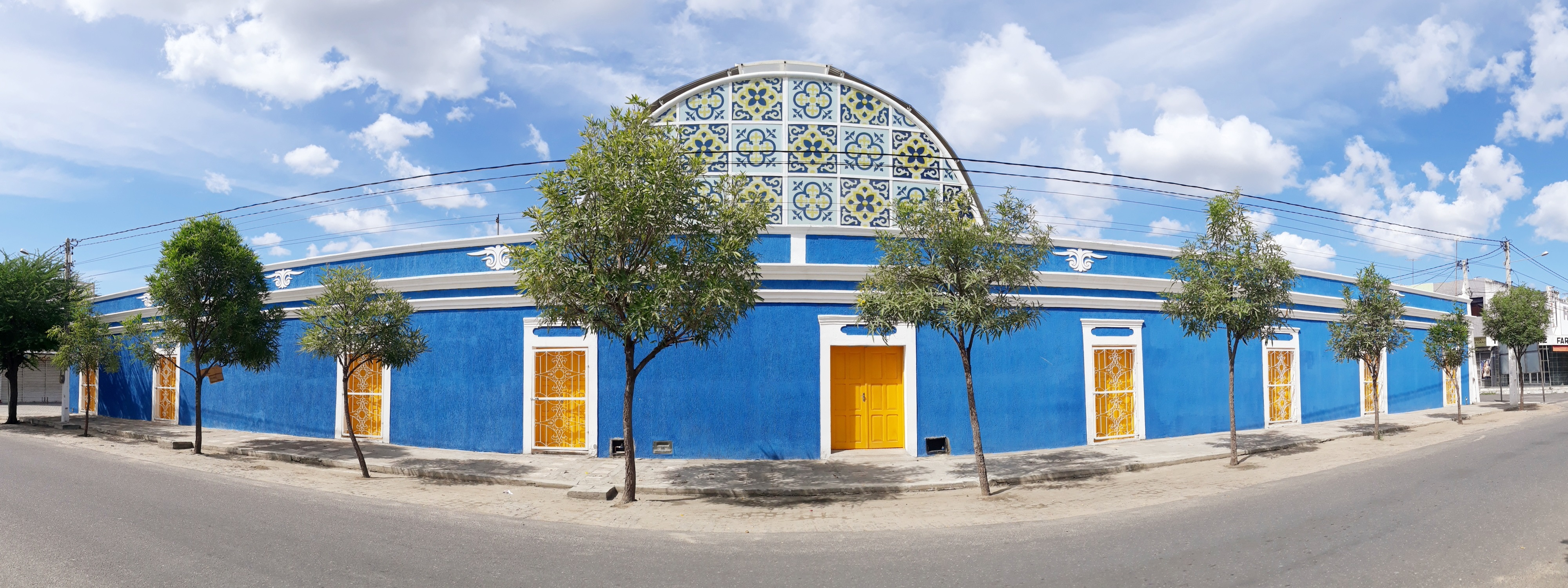 Mercado Público Municipal Antônio Soares de Holanda, integrante do patrimônio histórico e arquitetônico da cidade de Pau dos Ferros, no Rio Grande do Norte (Brasil)